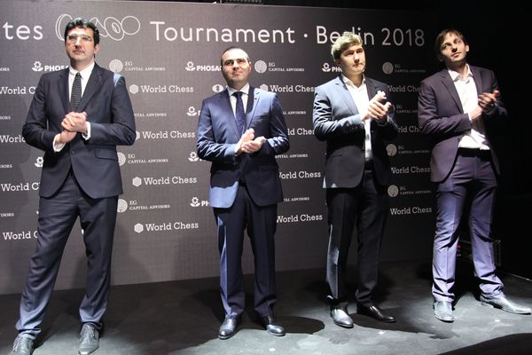 Турнир Претендентов 2018, Церемония открытия